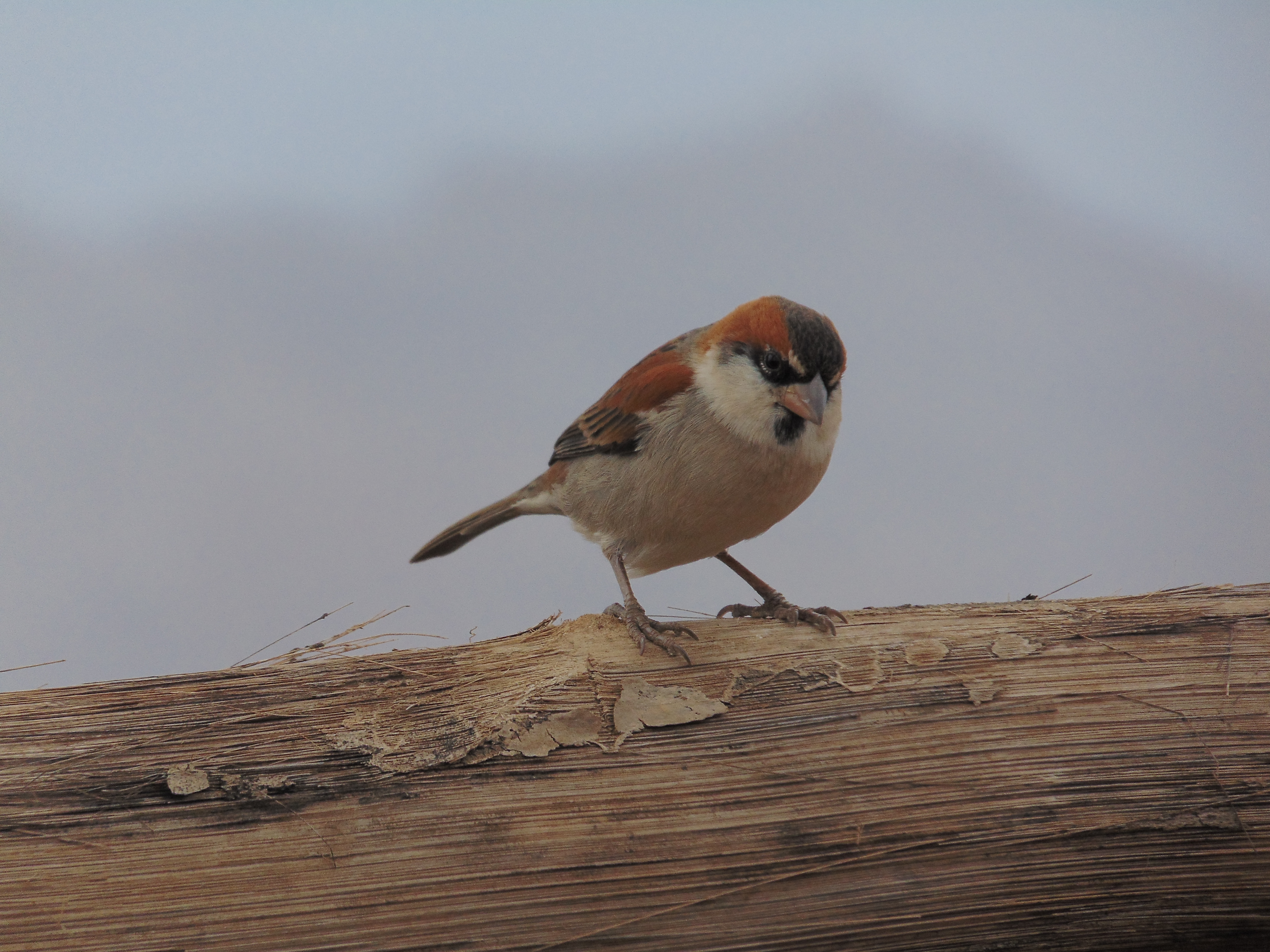 Passer Iagoensis fotografato a Monte Verde.